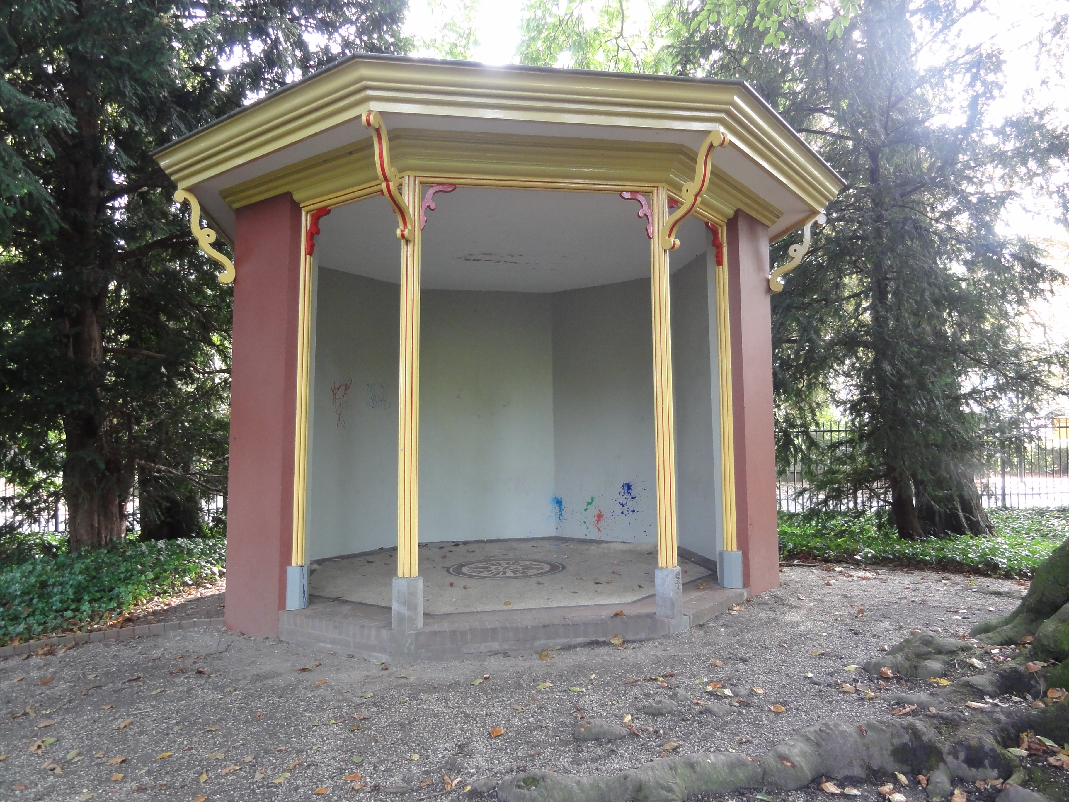 Tiel Rijksmonument 520659 theekoepeltje in Ambtmanstuin bij Ambtmanshuis 89″ E